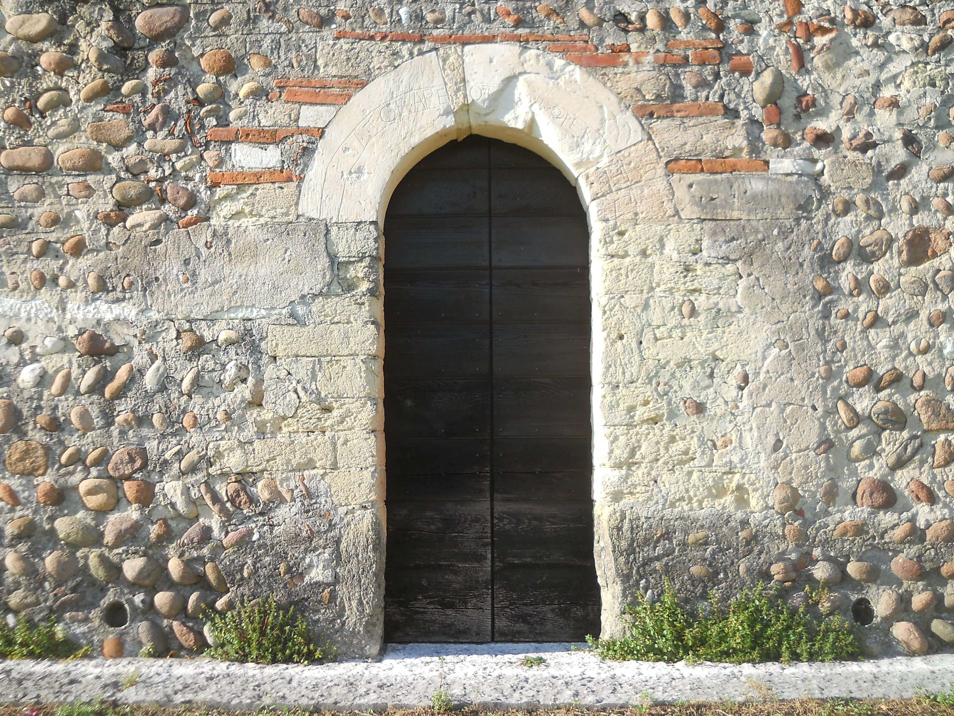 Chiesa di San Michele Pescantina (portale meridionale)